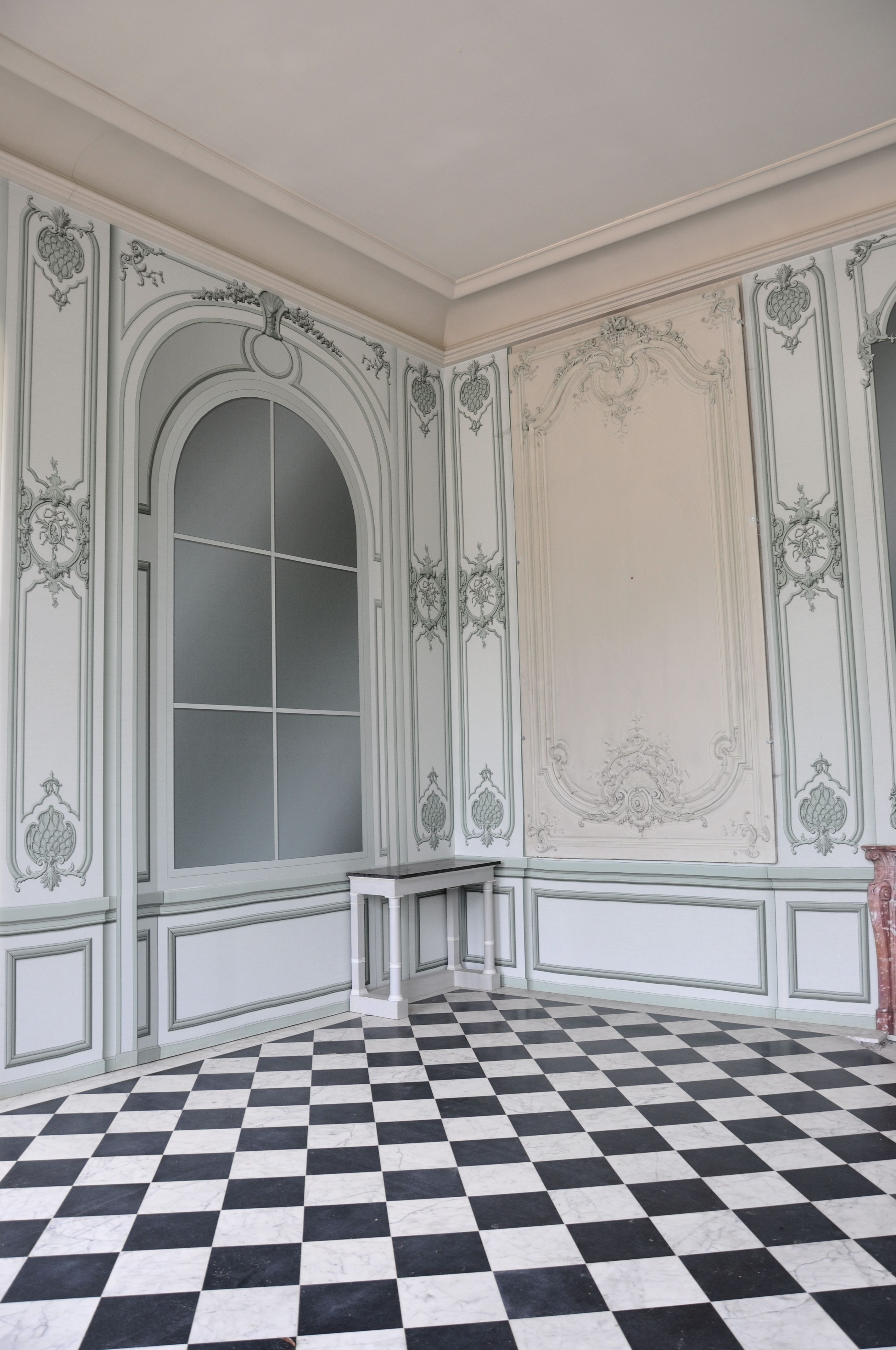 Intérieur du Pavillon frais, au Petit Trianon. Le panneau de droite est d'origine.